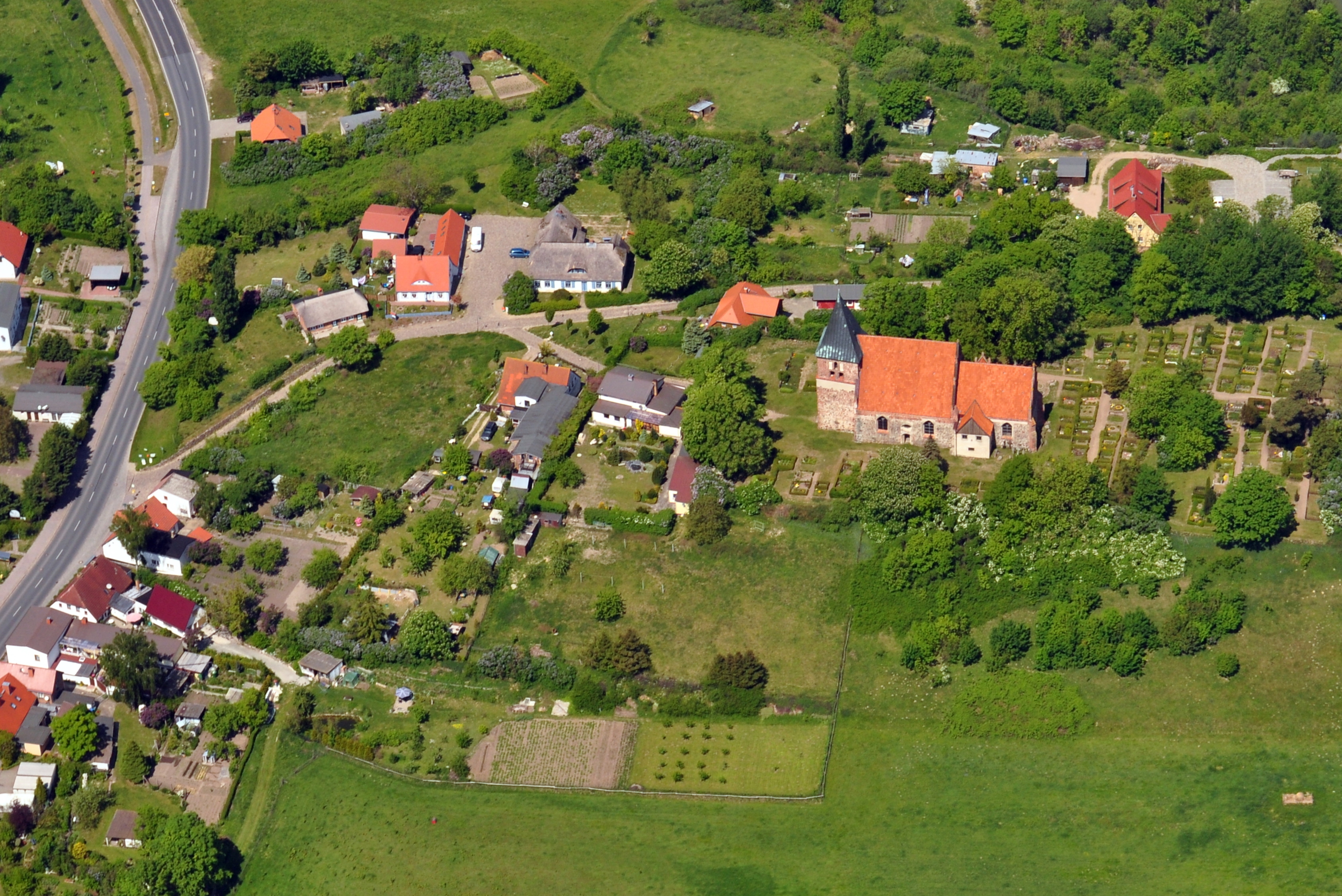 Die Bilder wurden von mir während eines einstündigen Rundflugs ab Flugplatz Güttin am 21. Mai 2011 aufgenommen. Die Bildbeschreibung steht im Dateinamen. Aufgenommen mit einer Nikon D5000 durch das Seitenfenster des Flugzeugs.